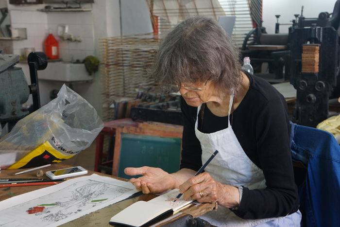 ליליאן קלאפיש בסדנת ההדפס ירושלים, 10/08/2017